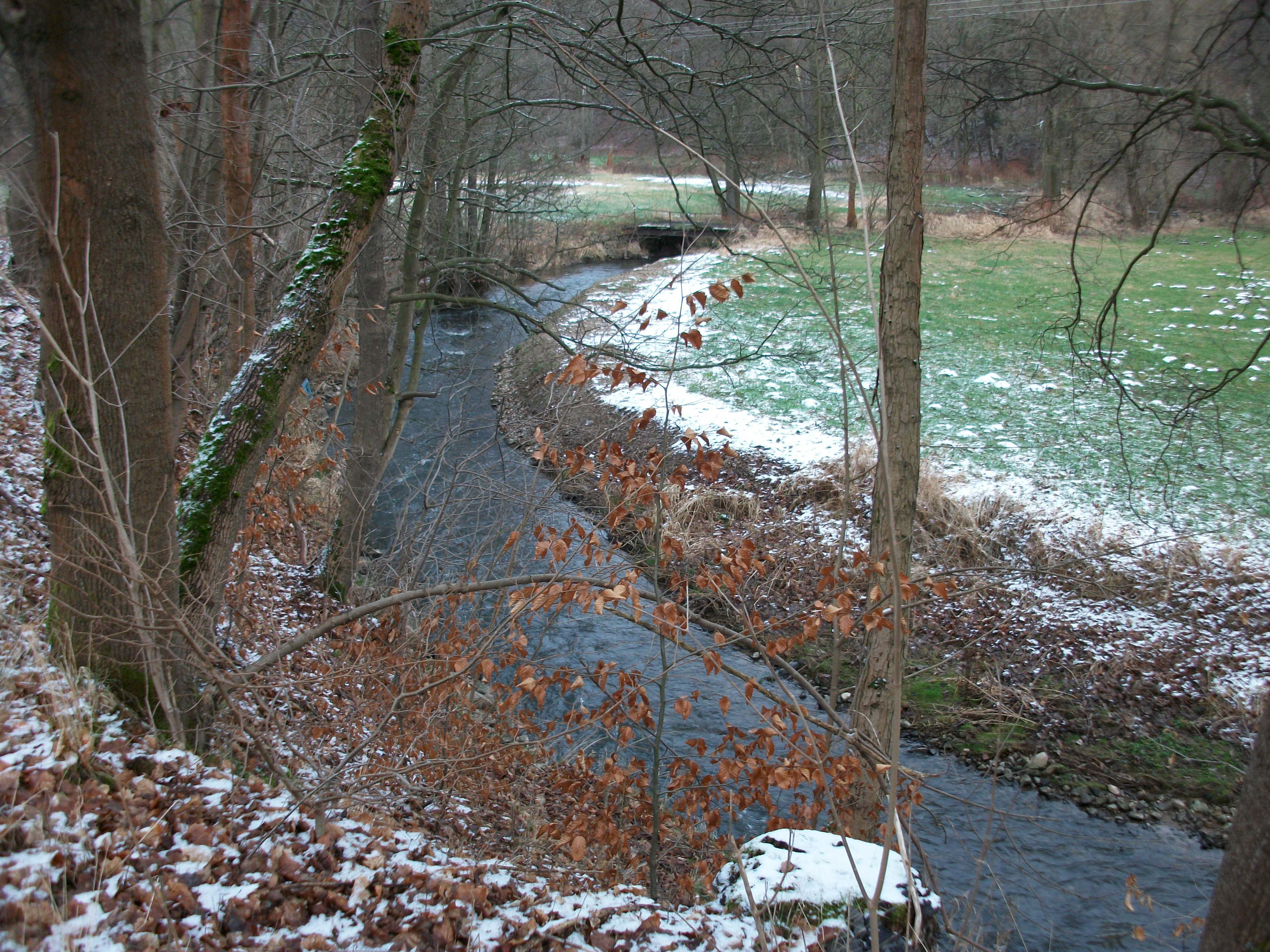 Rödelbach bei Cunersdorf